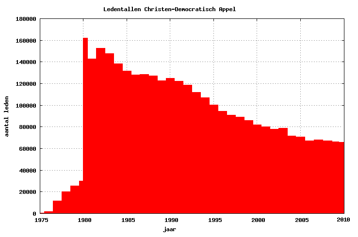 Ledenaantal CDA 1975-2010